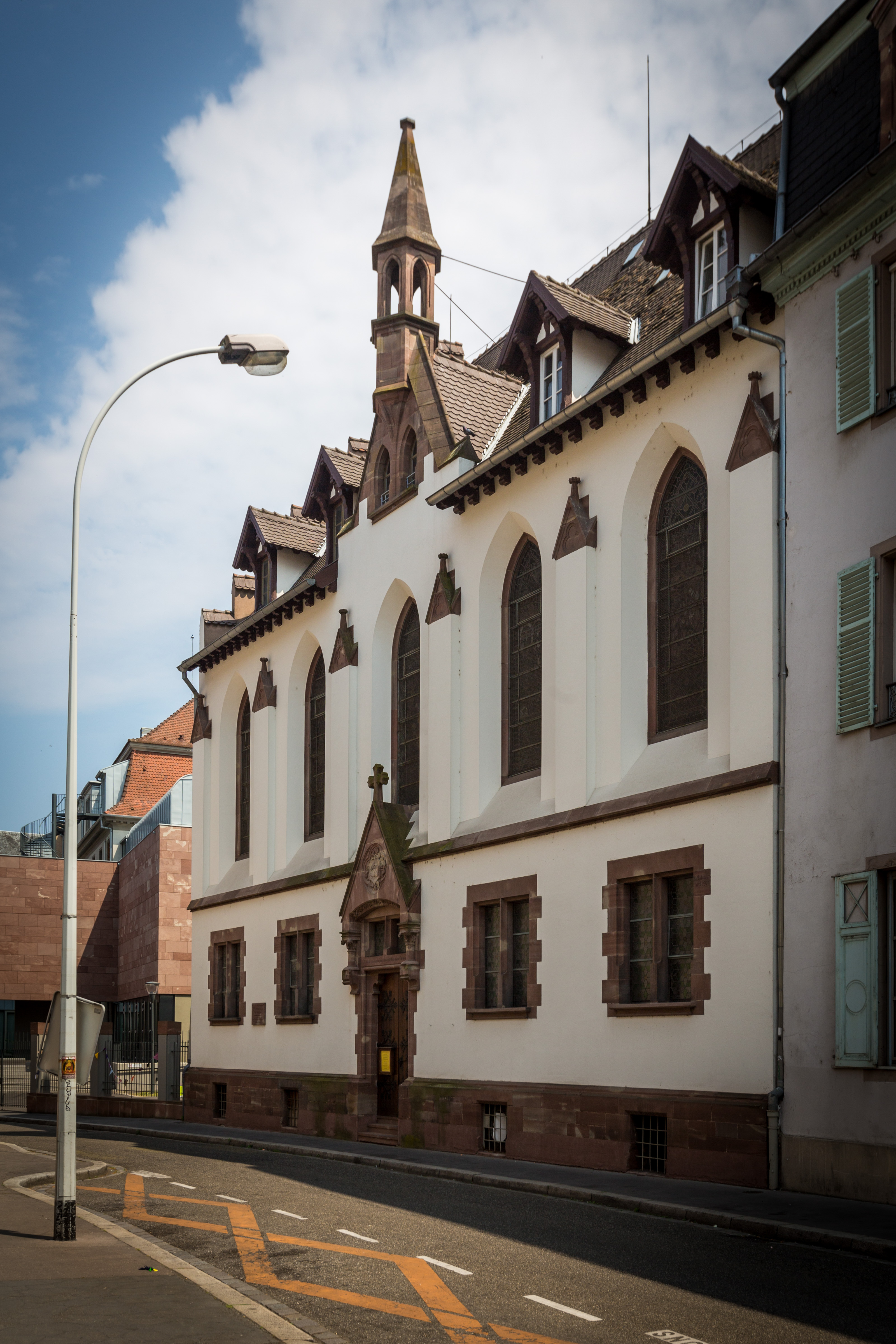 Strasbourg, la chapelle des Diaconnesses en juin 2015.